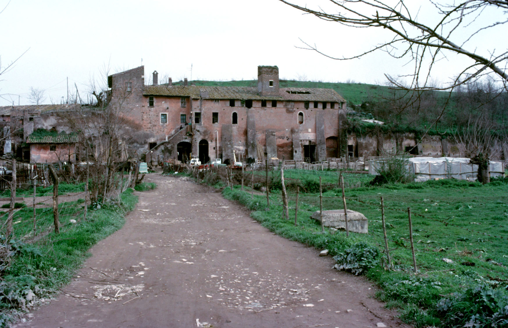 Casale Vaccareccia alla Caffarella (foto del 1986)